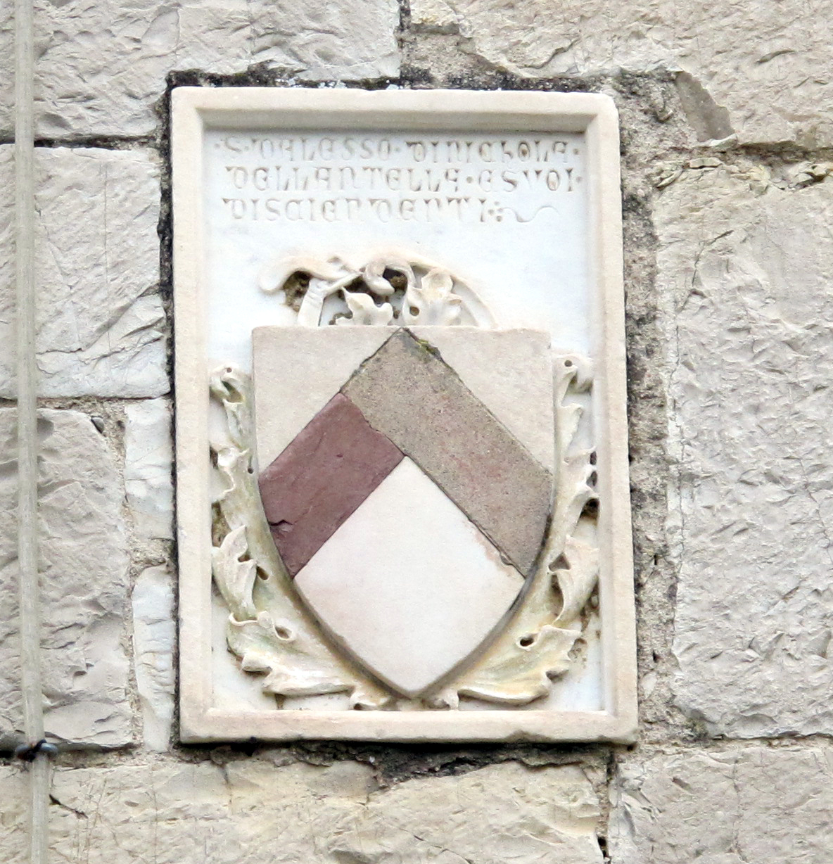 Antella, Bagno a Ripoli, Firenze, Italia